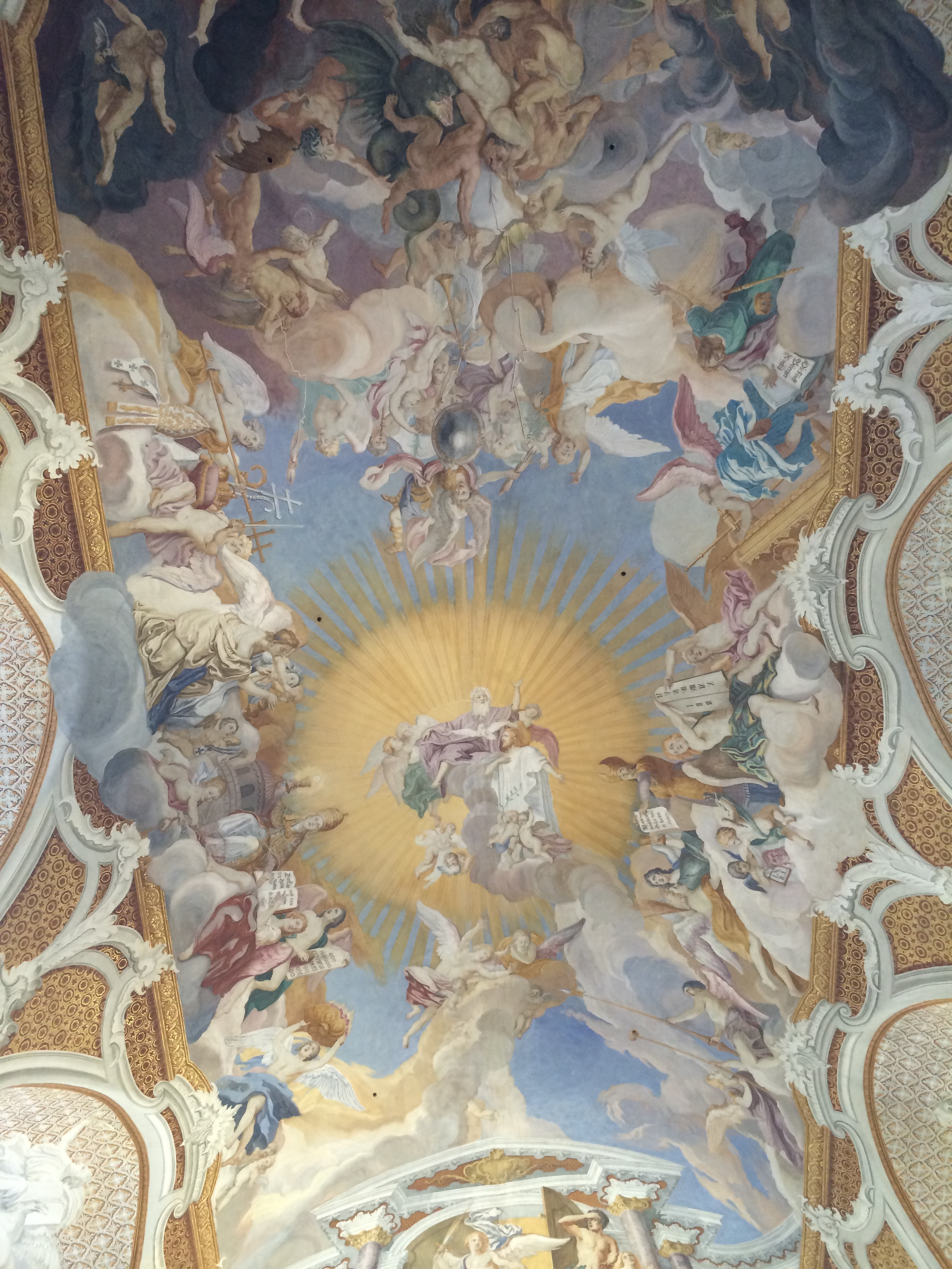 Klosterkirche St. Salvator in Sankt Salvator, Deckenfresko von Franz Anton Rauscher